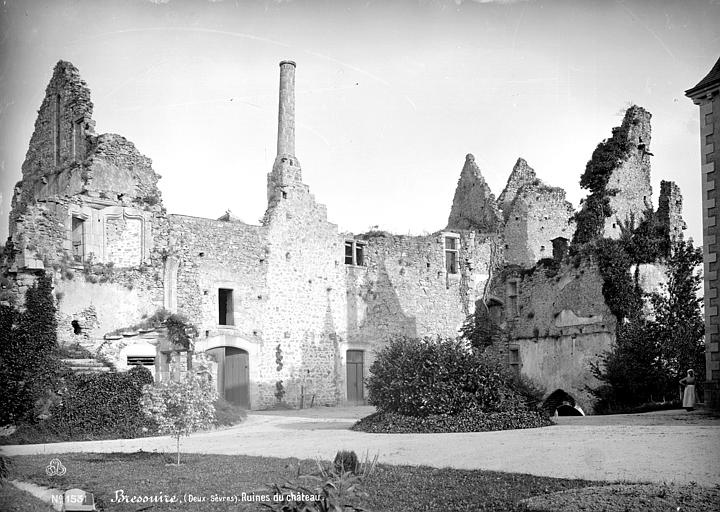 Cour intérieure du château de Bressuire. Photographie de Séraphin-Médéric Mieusement.